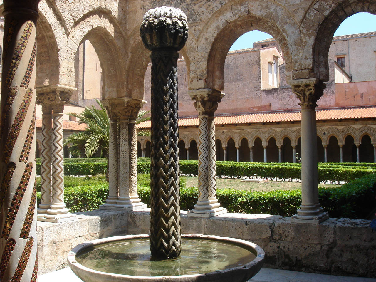 Cattedrale di Monreale. Оригинальный арабский фонтан в клуатре (внутреннем дворе) монастыря Монреале (Сицилия)